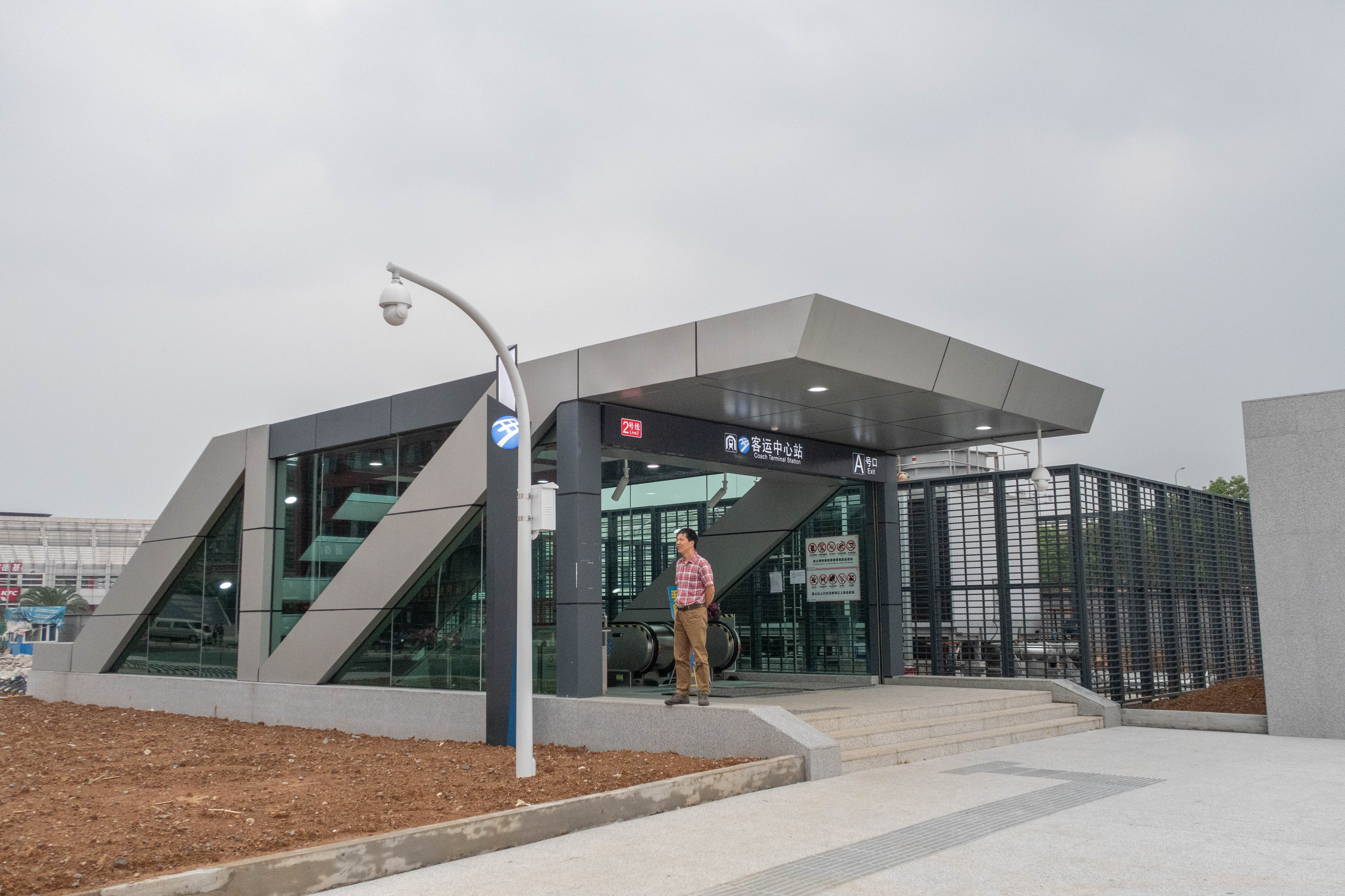 宁波轨道交通2号线客运中心站